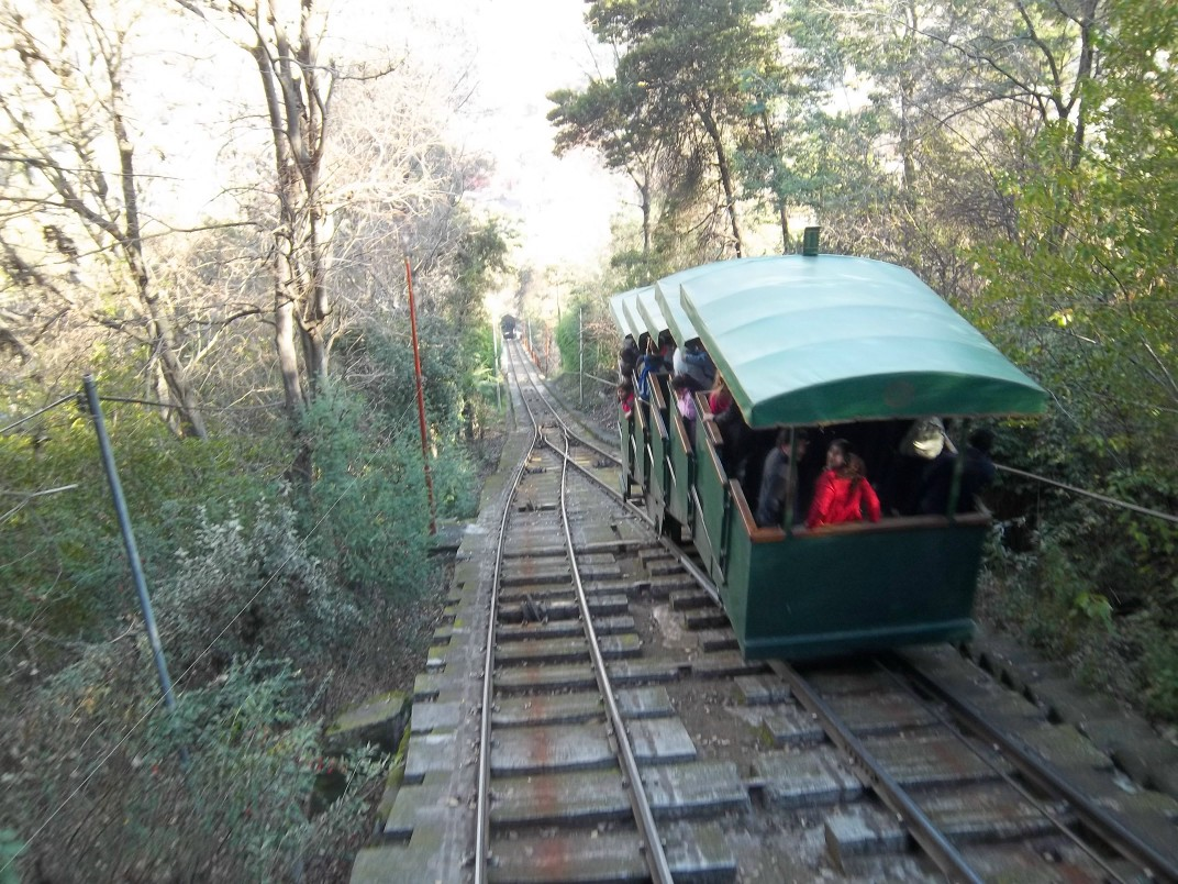 Cruce de funiculares en el Cerro San Cristóbal en Santiago de Chile, Región Metropolitana, Chile.